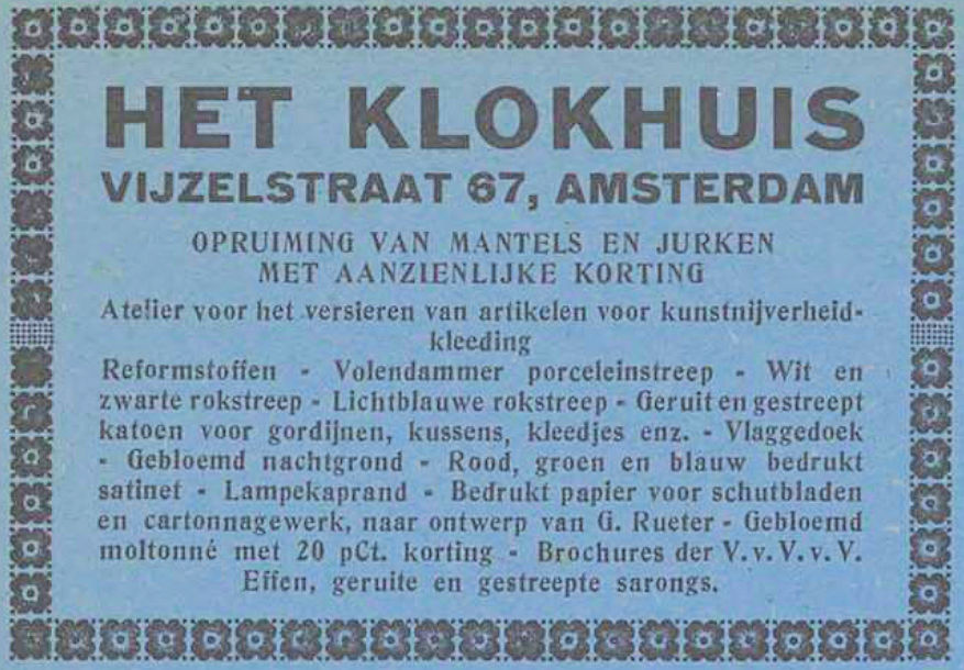 Advertentie van Het Klokhuis in Amsterdam (1919), winkel van Marie Faddegon en Leonie van Nierop.